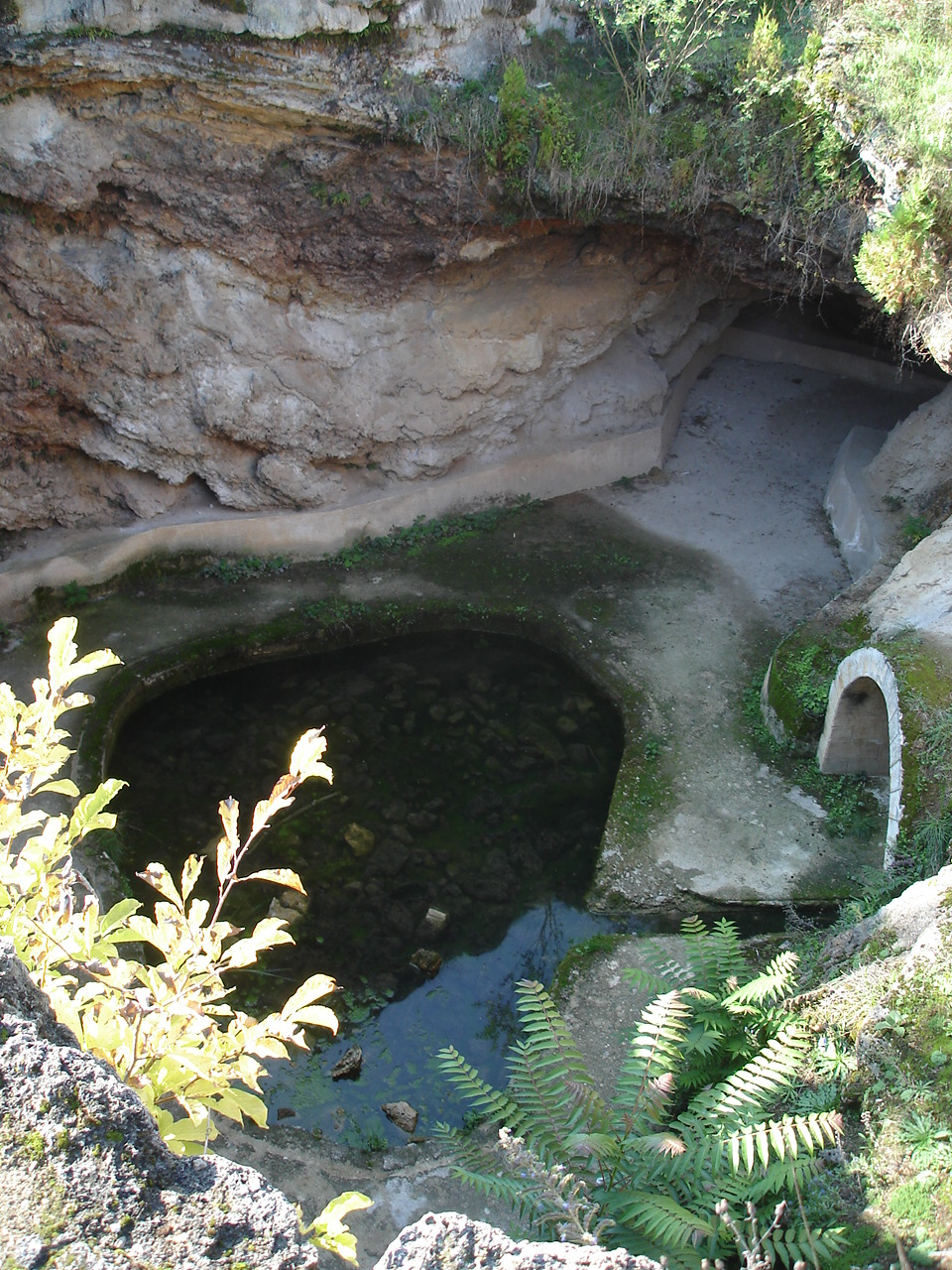 Roman baths in Geoagiu-Băi